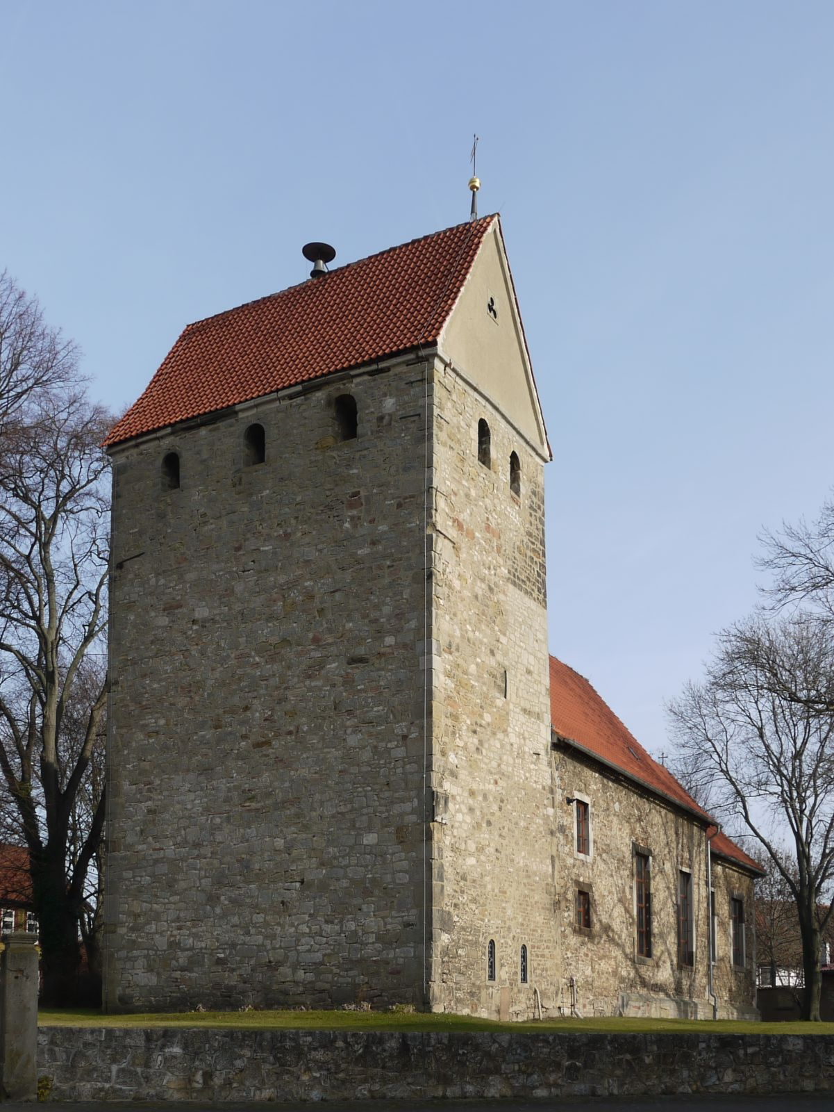 Kirche St. Nikolai in Salzgitter-Barum